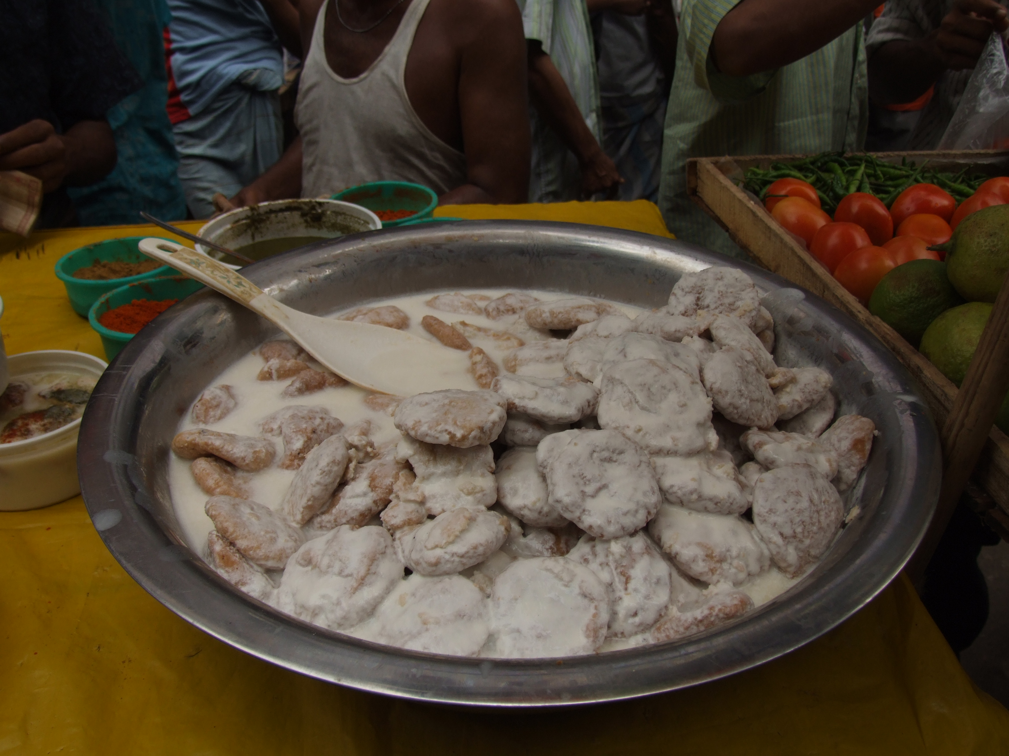 Iftar items available @ puran Dhaka